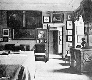 Nikolai Karamzin's study in Ostafyevo Estate.